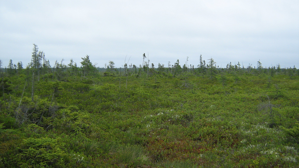 Tourbière dans le parc national de Kouchibouguac